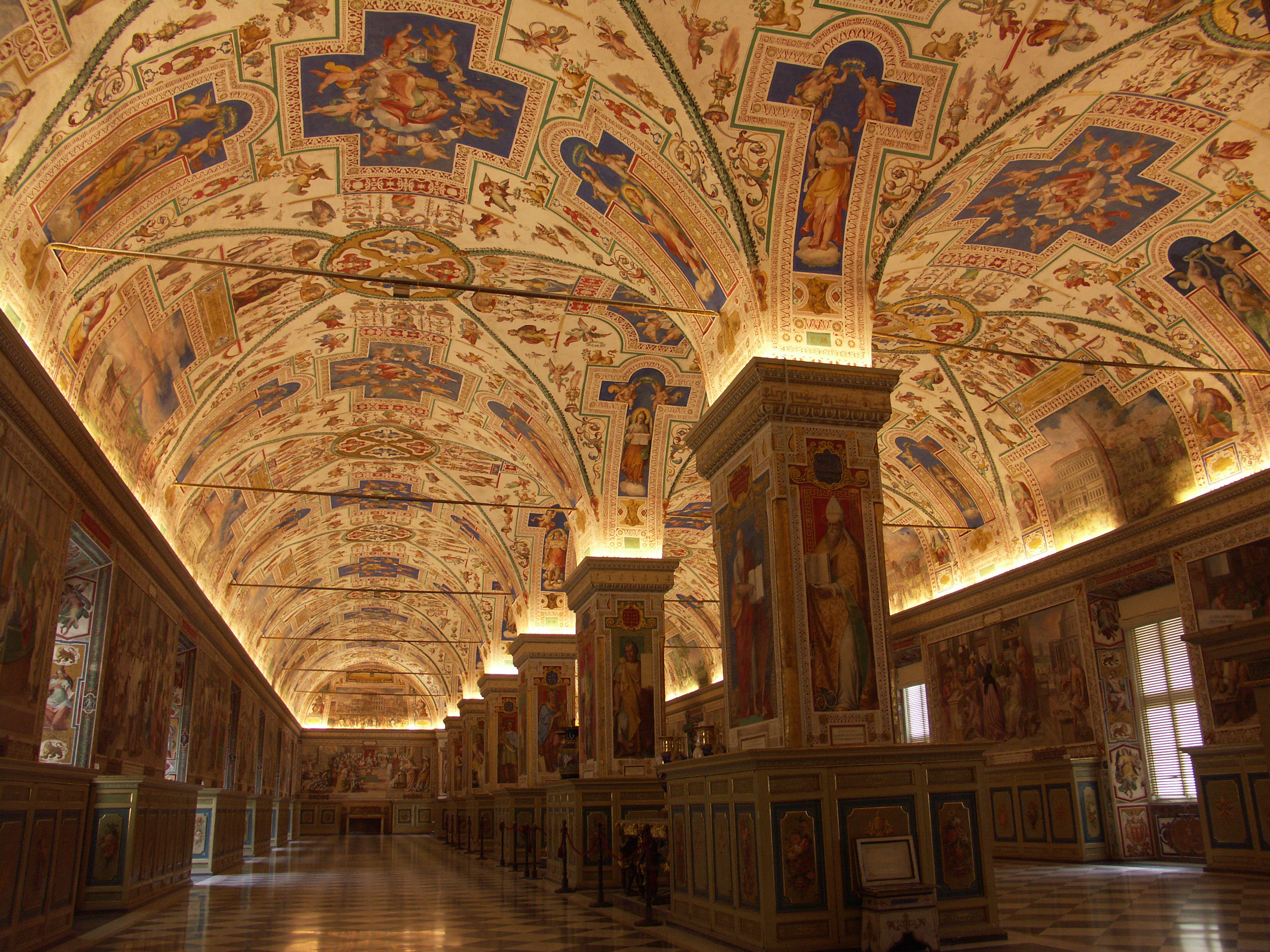 Rom, Vatikanische Museen, Großer Saal der Bibliothek, Salone Sistino